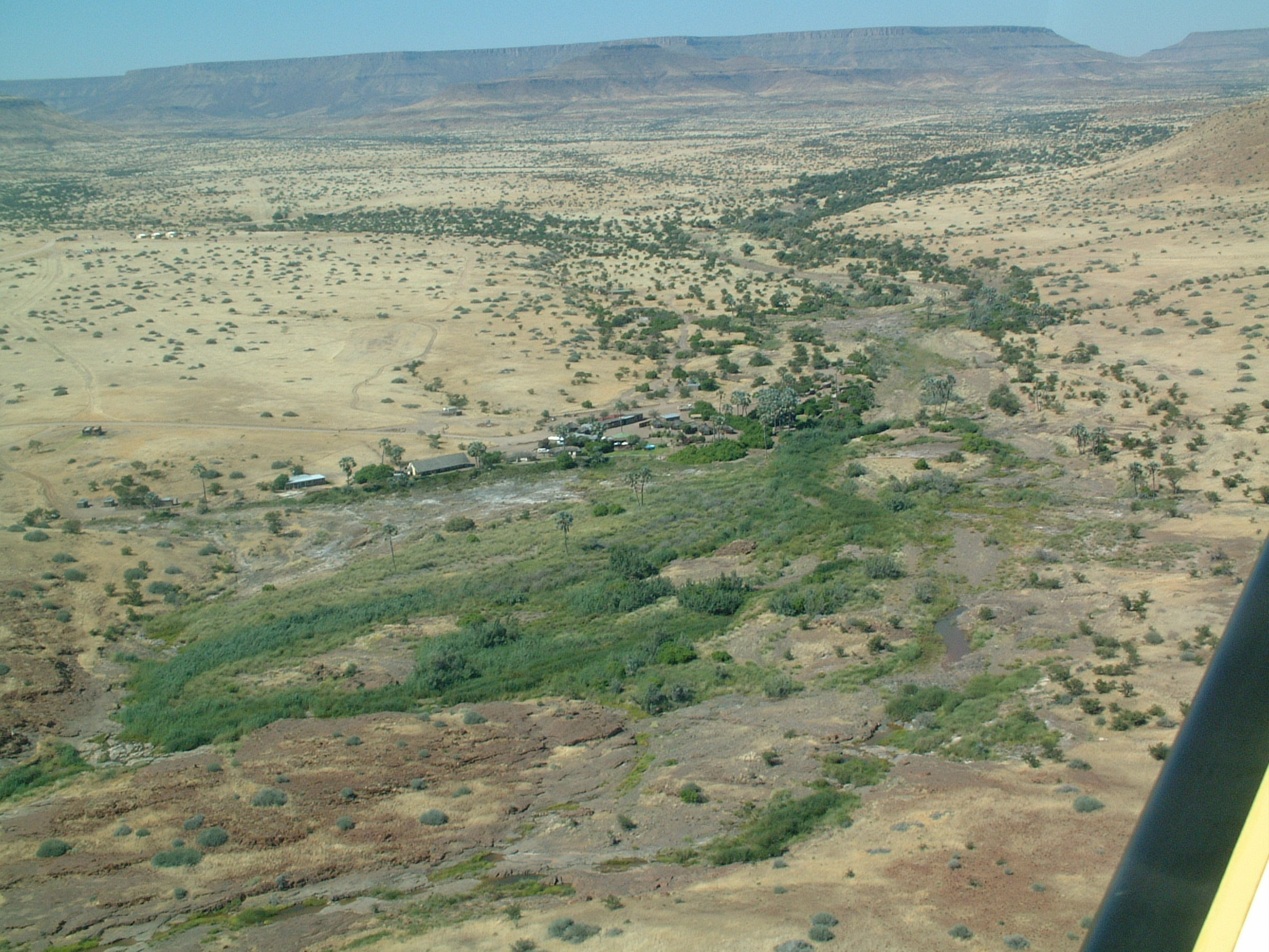 Namibia von oben